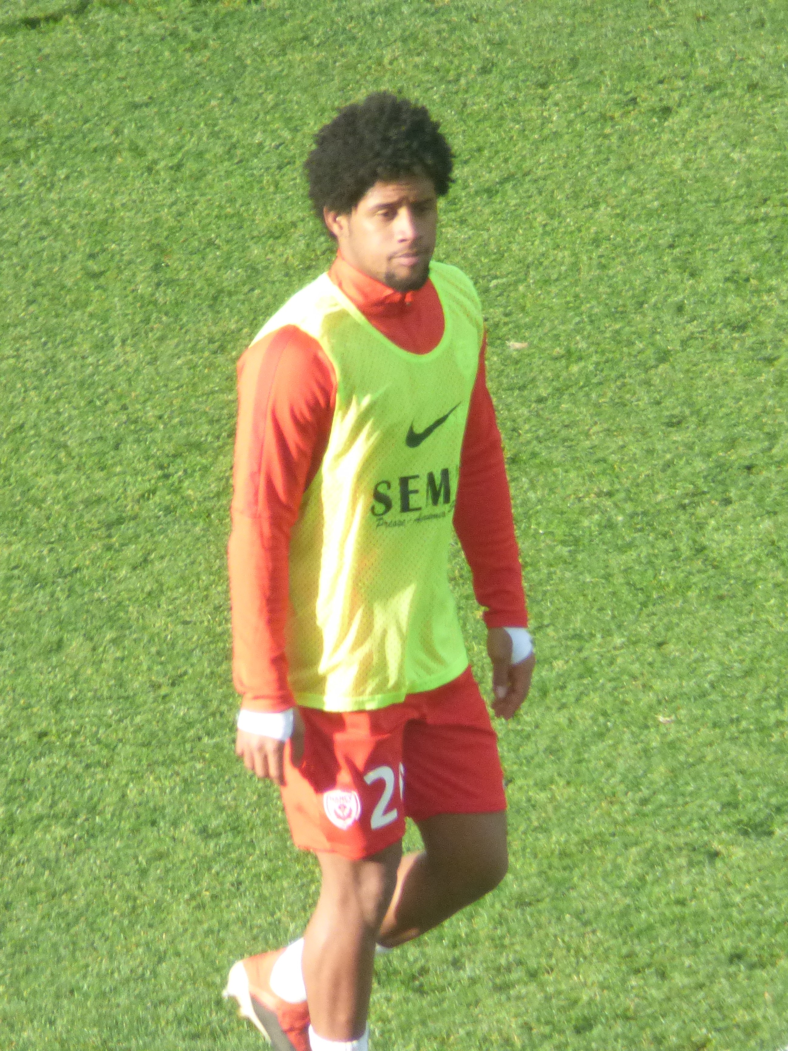 Vagner Dias Gonçalves avant le match RC Lens / AS Nancy-Lorraine, comptant pour la vingt-et-unième journée du championnat de France de football de Ligue 2 2018-2019, le 19 janvier 2019, au Stade Bollaert-Delelis de Lens.